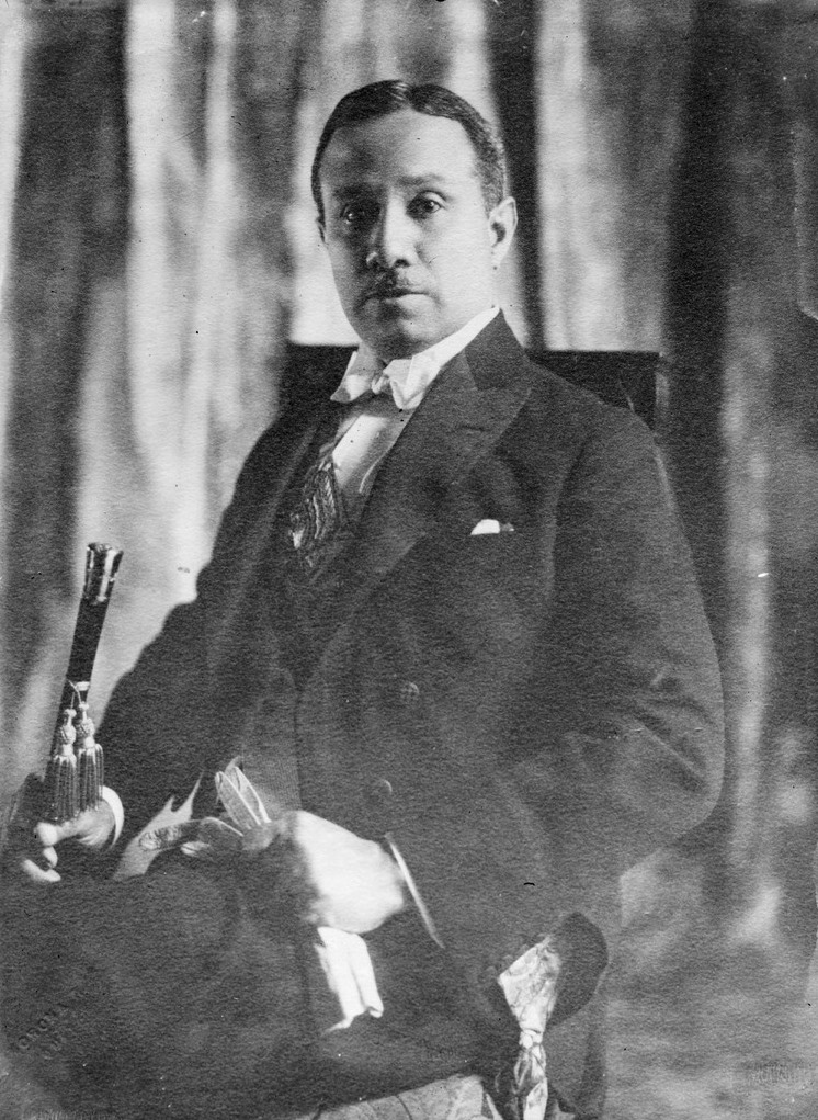 El presidente de la República del Ecuador, Dr. Juan de Dios Martínez Mera, en el año 1933